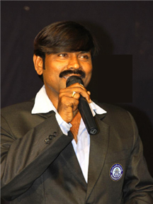 Founder President of Telugu Book of Records and Multiple World Records Holder